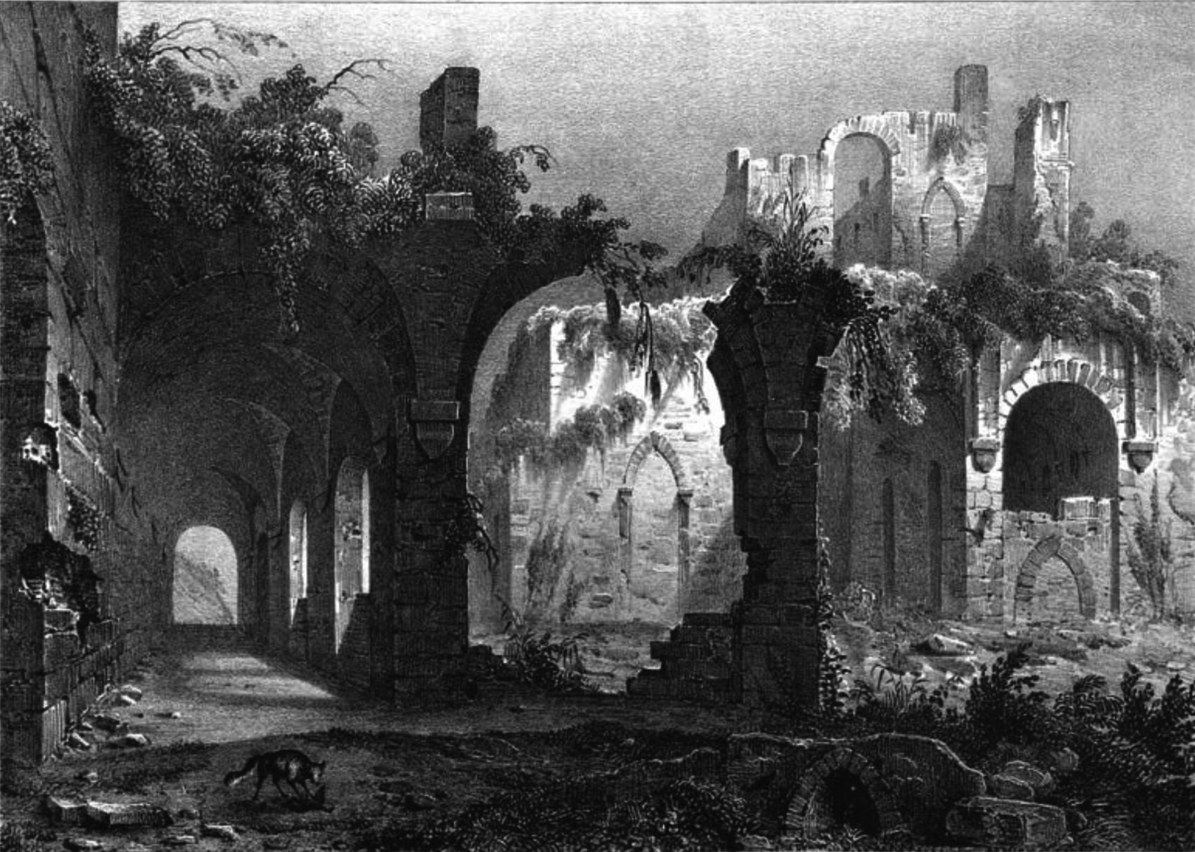 Album du Dauphiné - tome III, lithographie des ruines de la Chartreuse de Saint Hugon, près d'Arvillard